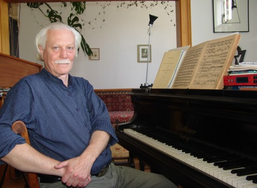 Günther Witschurke (Foto von Ronny Seifarth)